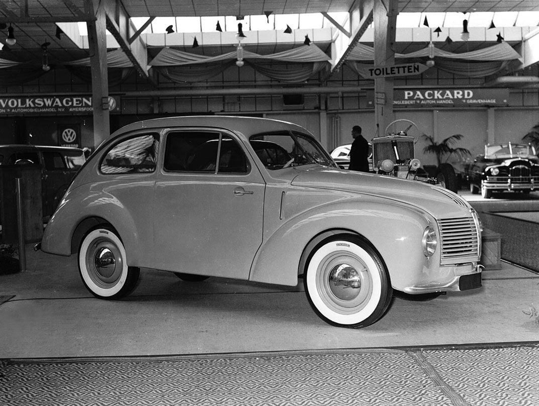 Jawa Minor II of Aero Minor uit Tsjechoslowakije op de RAI autotentoonstelling, Amsterdam, 17 april 1950. Foto Ben van Meerendonk / AHF, collectie IISG, Amsterdam